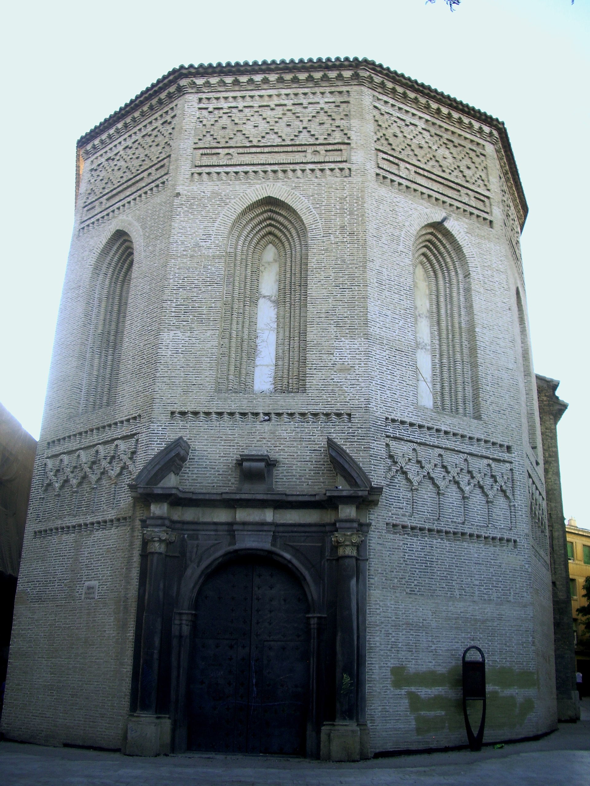 Iglesia de la Magdalena (Zaragoza)